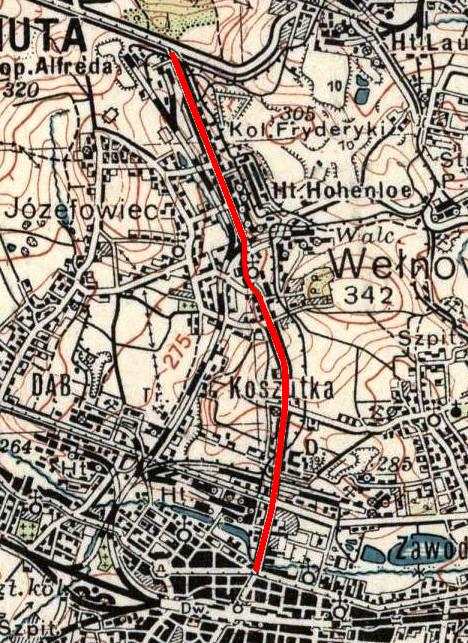 Mapa alei Wojciecha Korfantego (ówczesnej Zamkowej) w Katowicach. Ulica została zaznaczona czerwoną linią. Mapa pochodzi z roku 1939, jest aurtorstwa Wojskowego Instytutu Geograficznego w Warszawie. Skala 1:100000